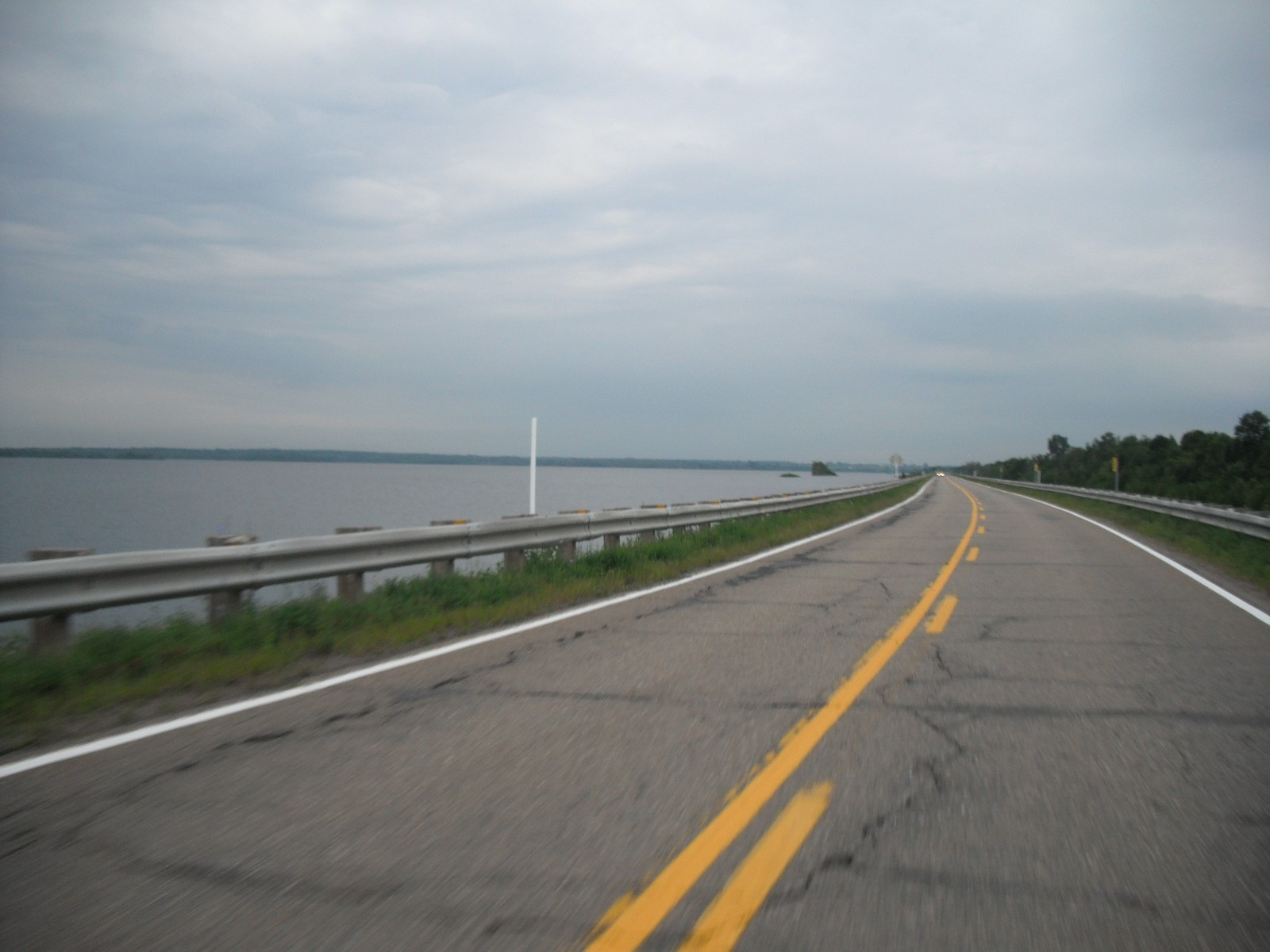 Vue sur la route 344, dans la municipalité de Saint-André-d'Argenteuil (région des Laurentides), Québec, Canada.